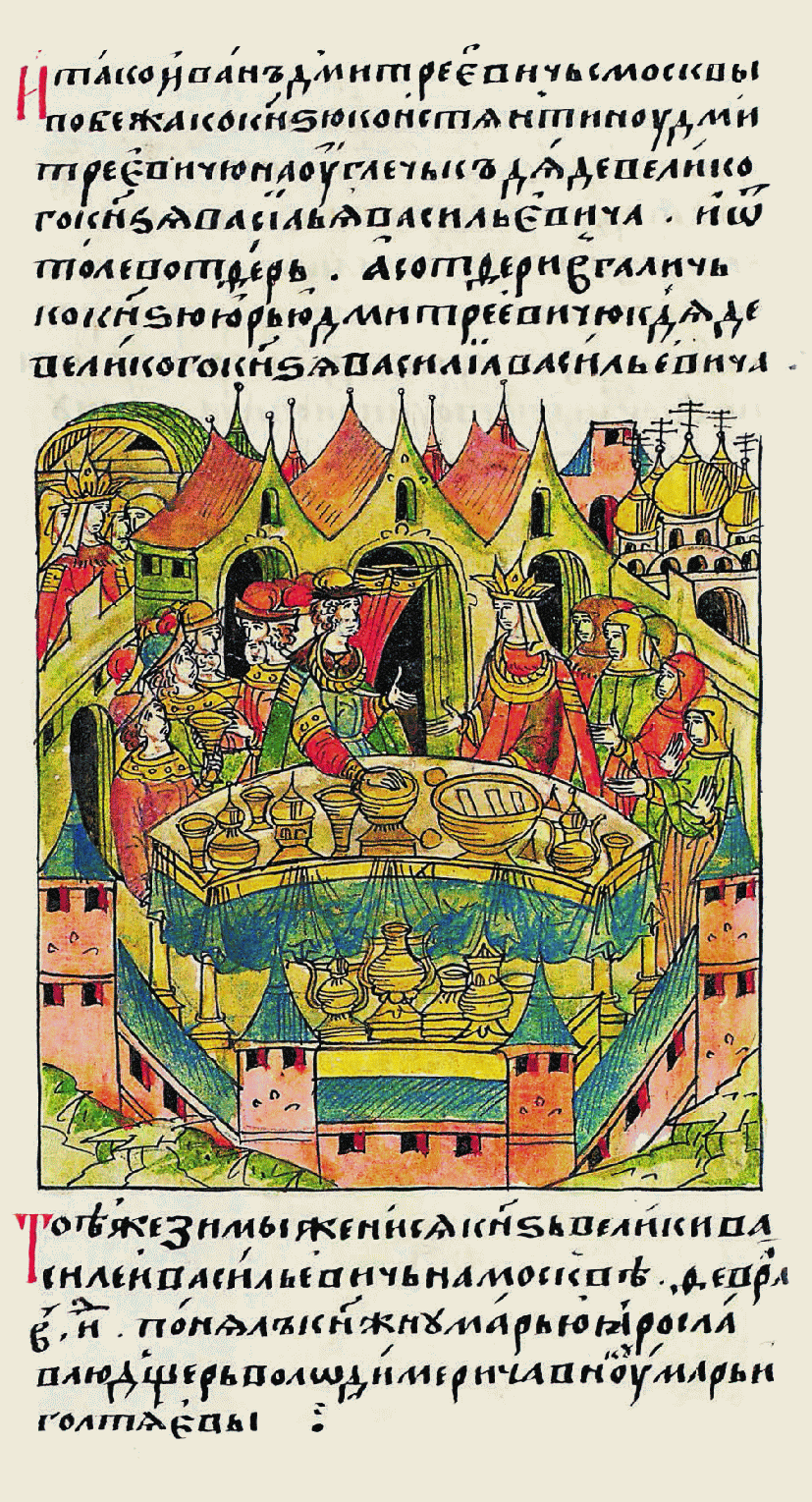 Лицевой летописный свод В ту же зиму женился великий князь Василий Васильевич в Москве месяца февраля в 8 день, взял за себя княжну Марью, дочь Ярослава Владимировича, внучку Марии Голтяевой.